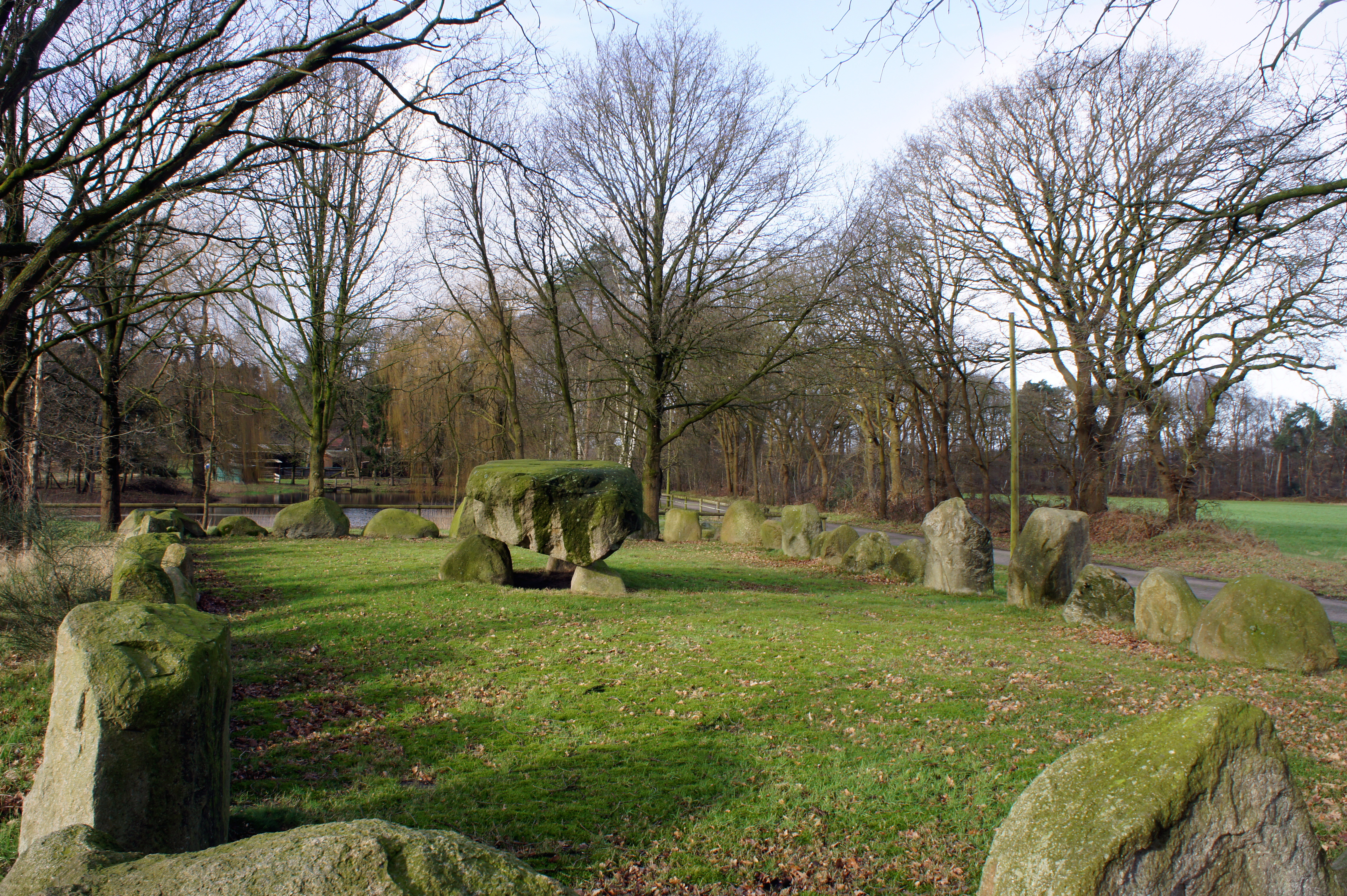 Nachbildung einer alten Thingstätte in Dingstede im Landkreis Oldenburg